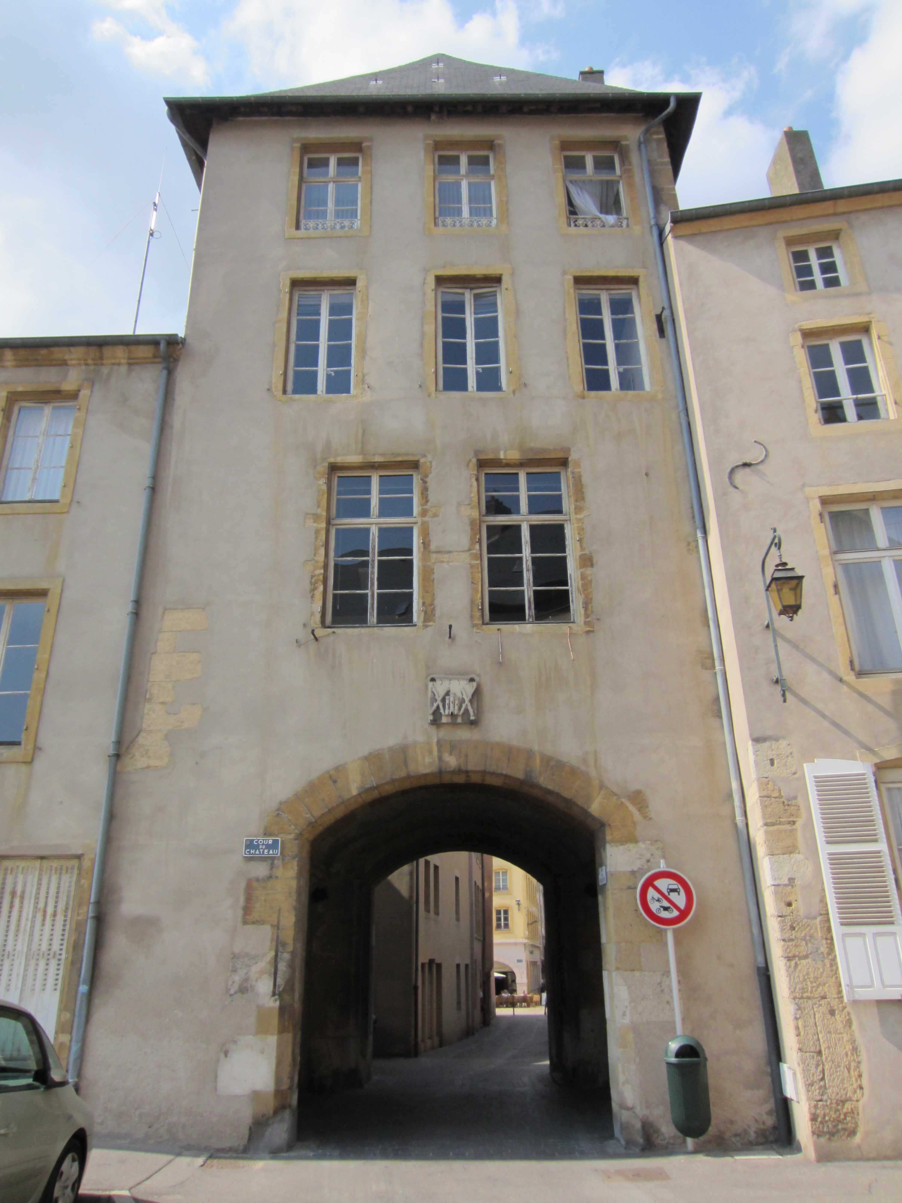 Description Château fort des comtes de Luxembourg Thionville Date26 August 2011Sourcemon appareil photoAuthorAimelaimePermission (Reusing this file) Château fort des comtes de Luxembourg Thionville